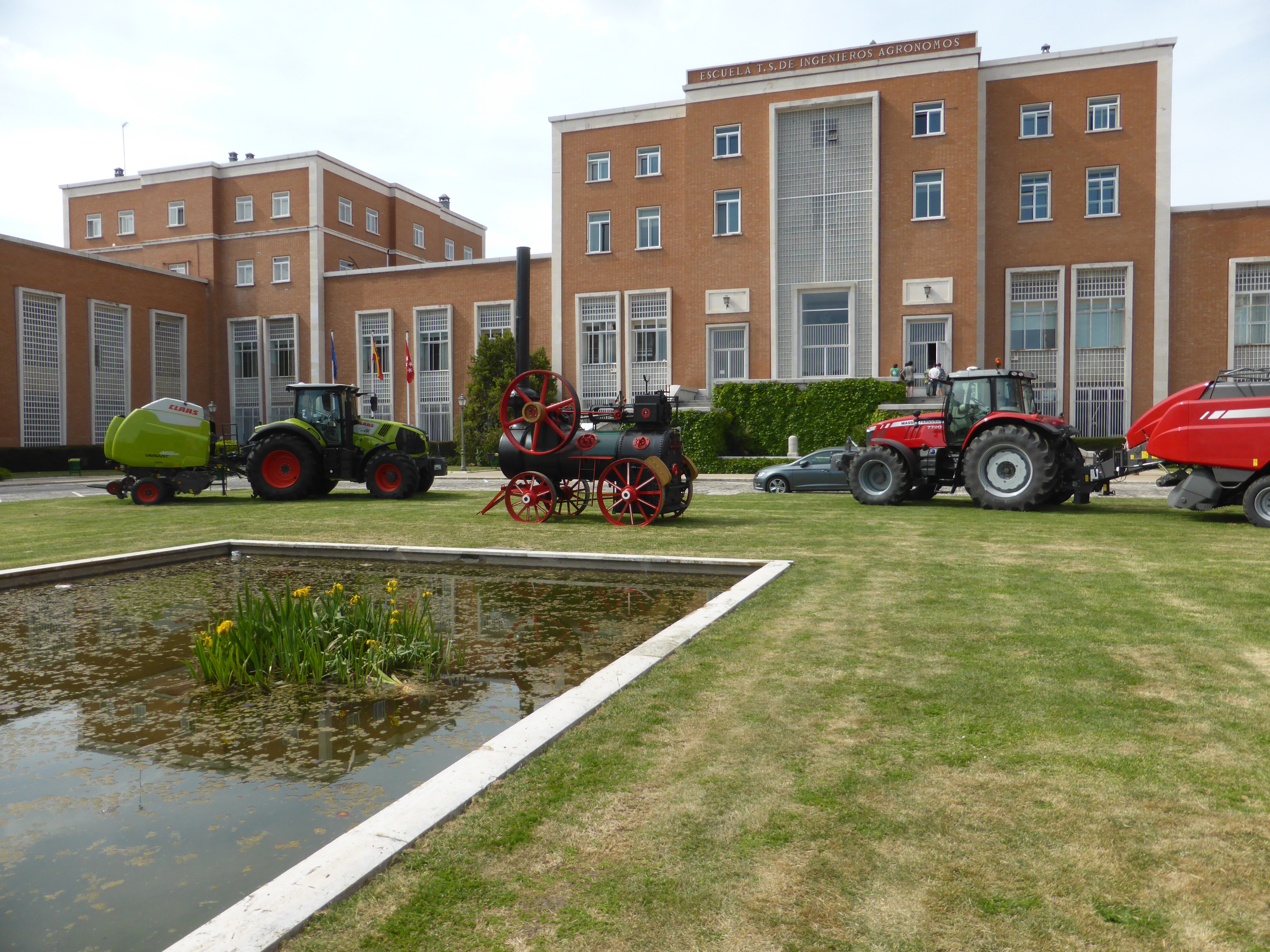 Muestra temporal de maquinaria agrícola en la sede de la "Escuela Técnica Superior de Ingenieros Agrónomos", de la "Universidad Politécnica de Madrid" (UPM). Su nuevo nombre es: "Escuela Técnica Superior de Ingeniería Agronómica, Alimentaria y de Biosistemas". Ciudad Universitaria de Madrid.